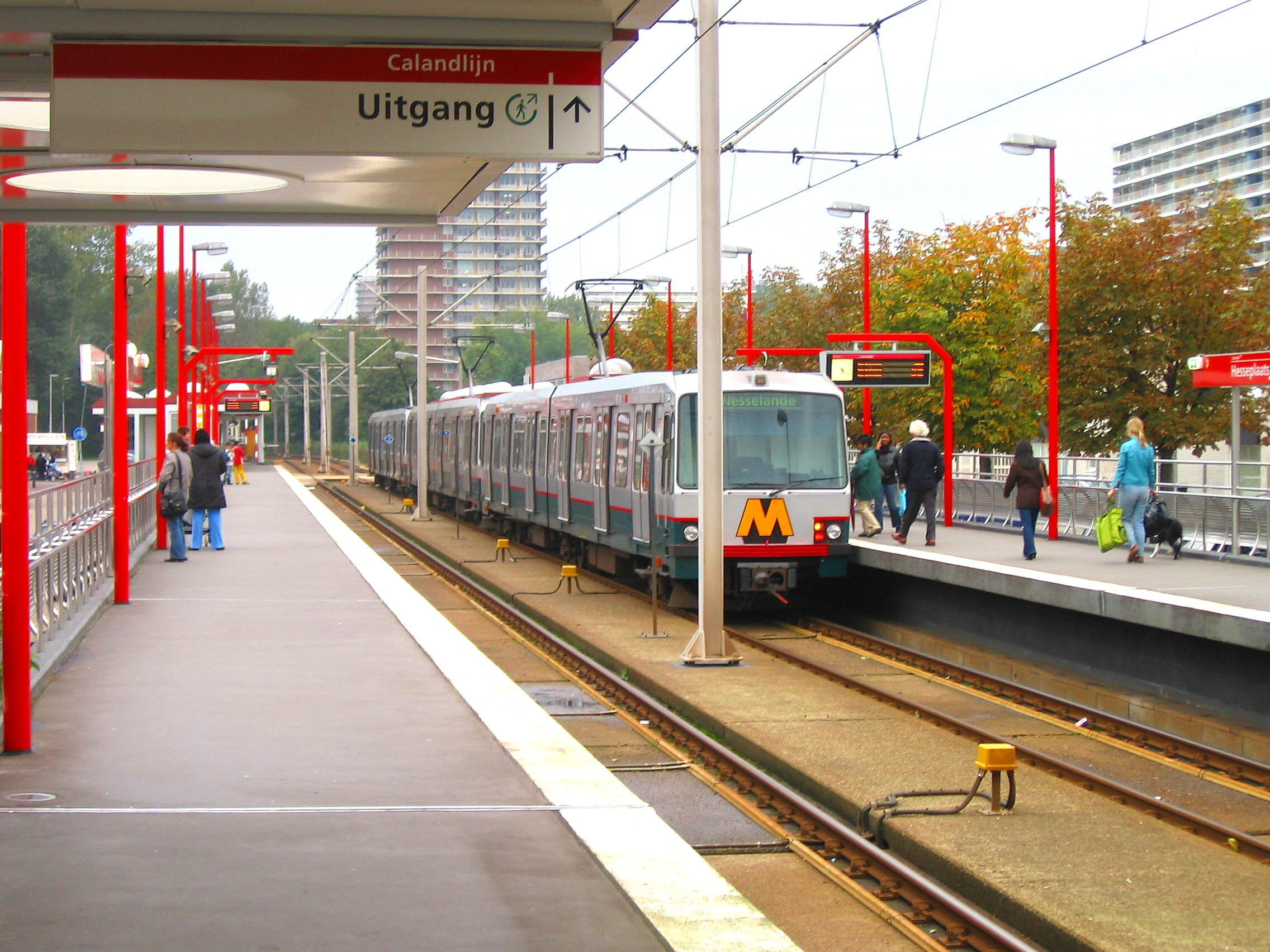 Metrostation Hesseplaats gezien vanaf perron 2. Op perron 1 staat een metro/sneltram klaar om te vertrekken.